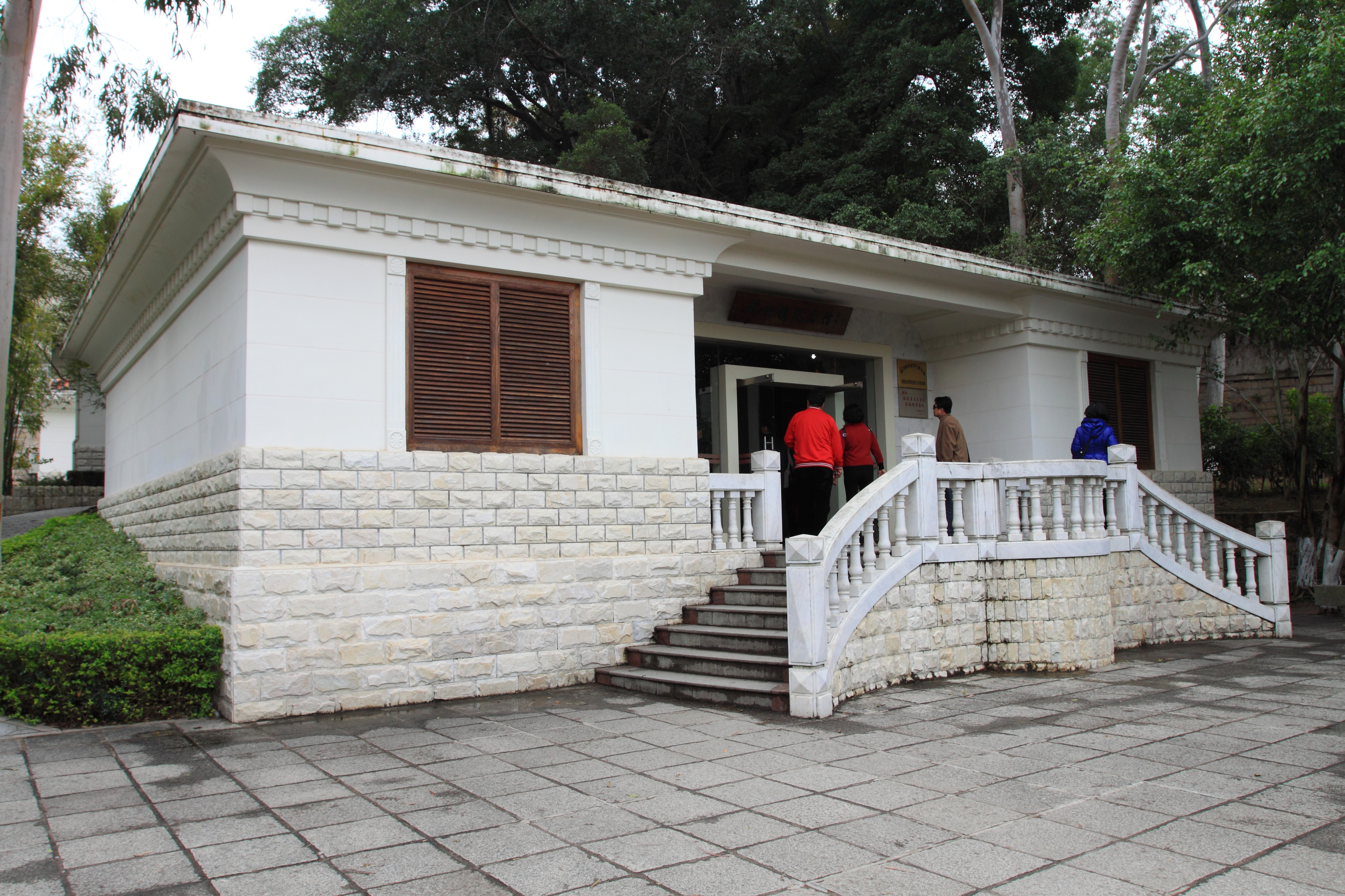 鼓浪屿毓园林巧稚纪念馆，位于中国福建省厦门市。